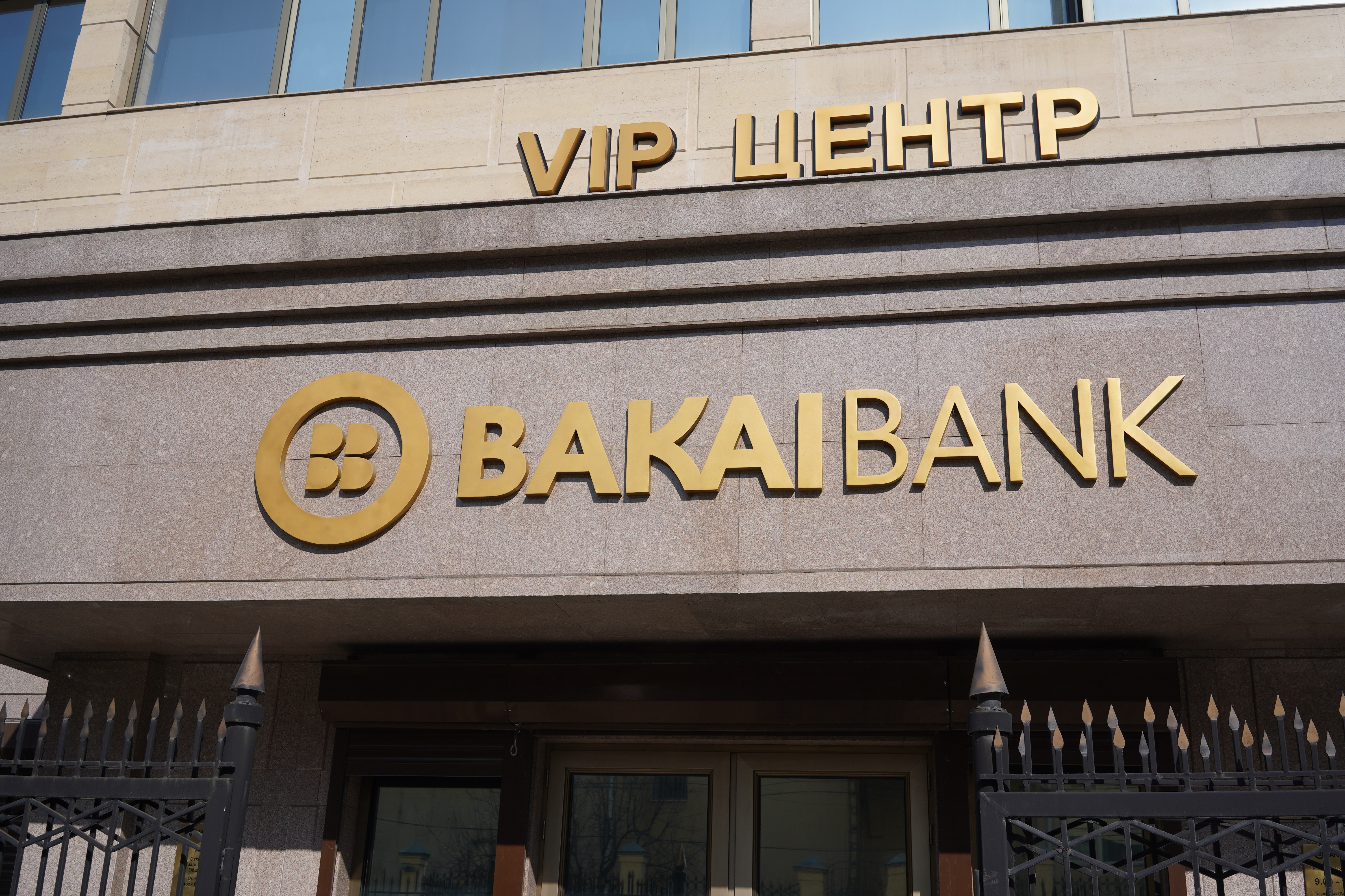 VIP-центр на Исанова, 77